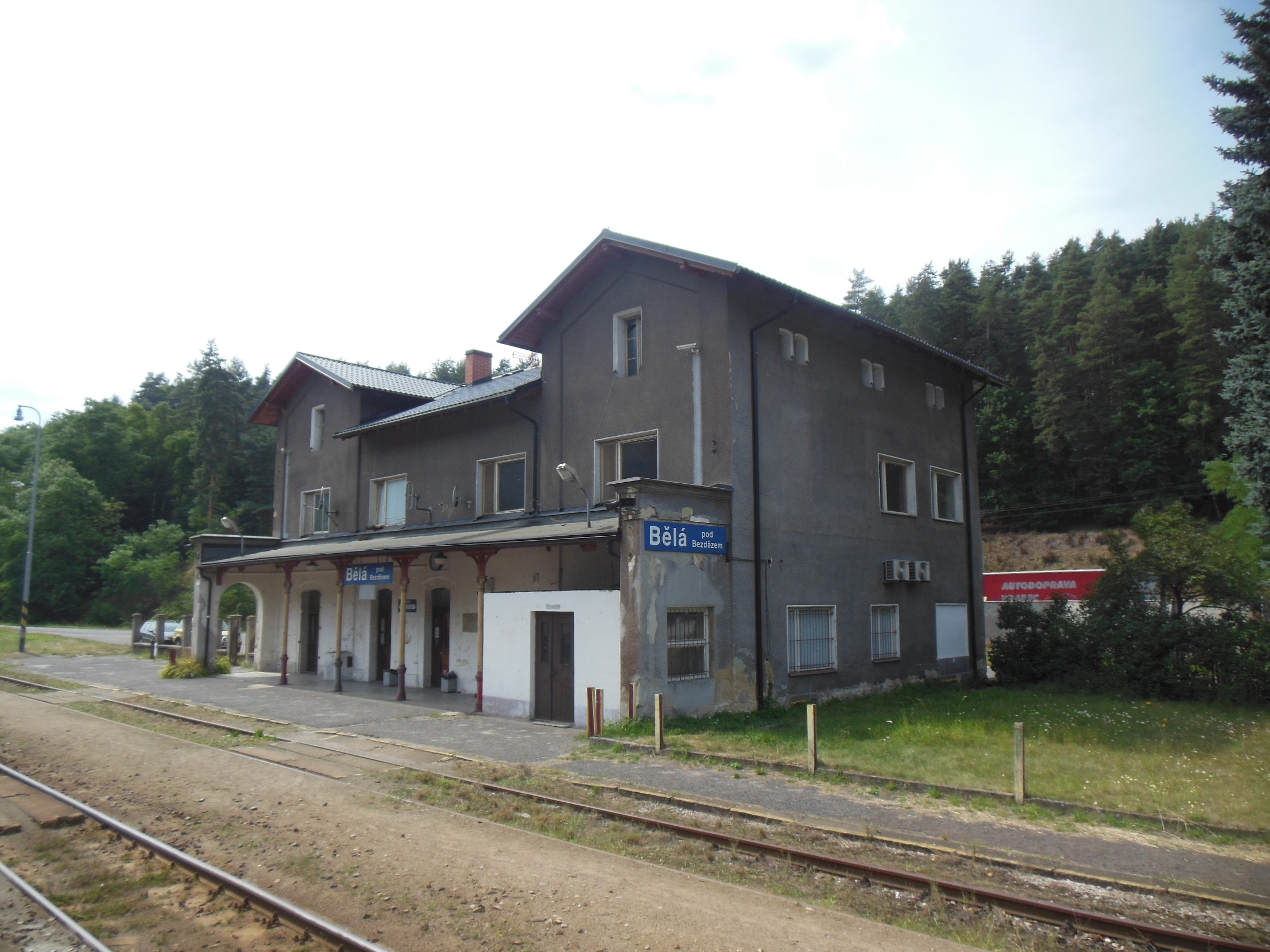 Bělá pod Bezdězem (okres Mladá Boleslav). Železniční stanice Bělá pod Bezdězem.